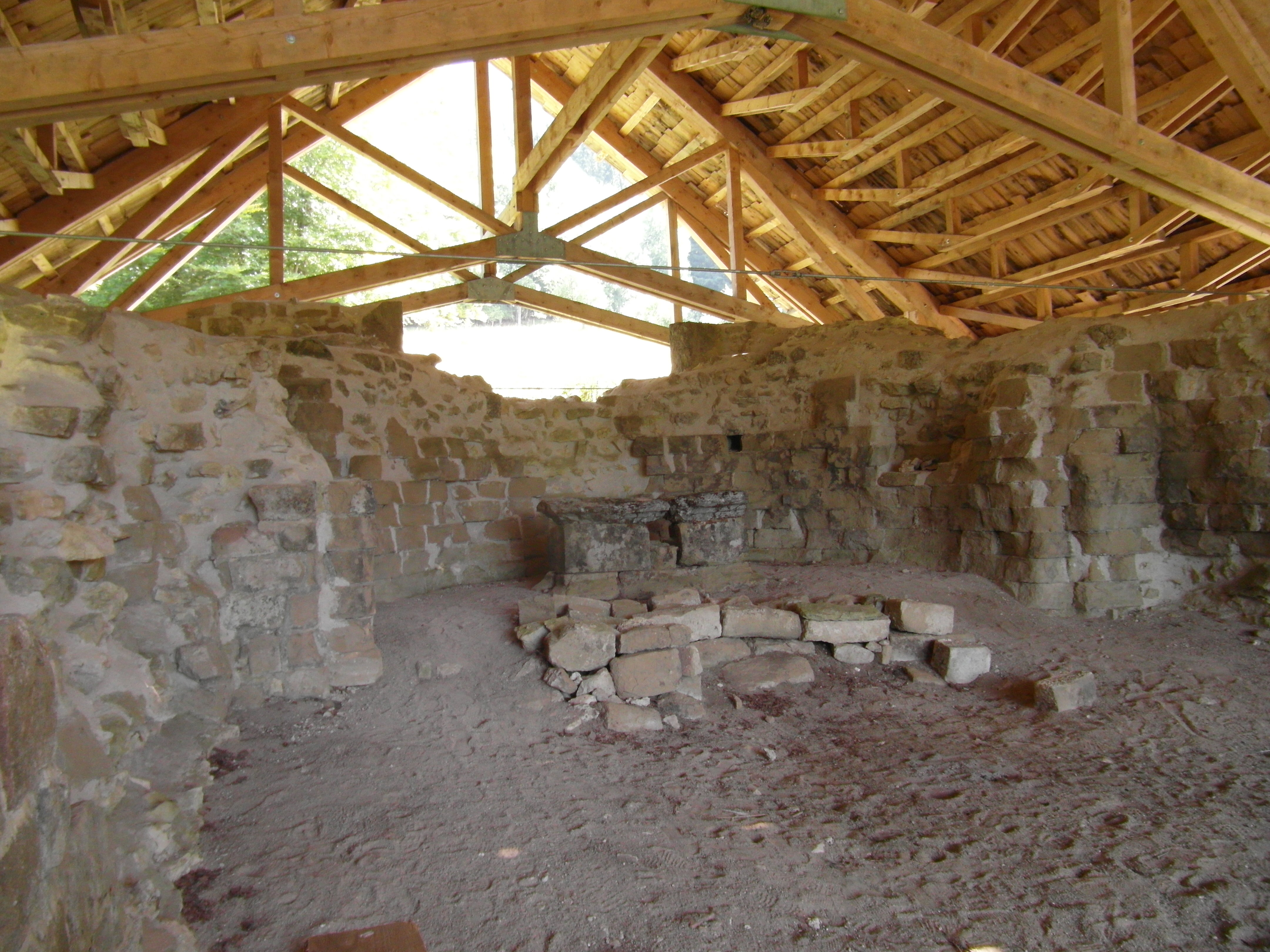 chartreuse des écouges, église en août 2017 02